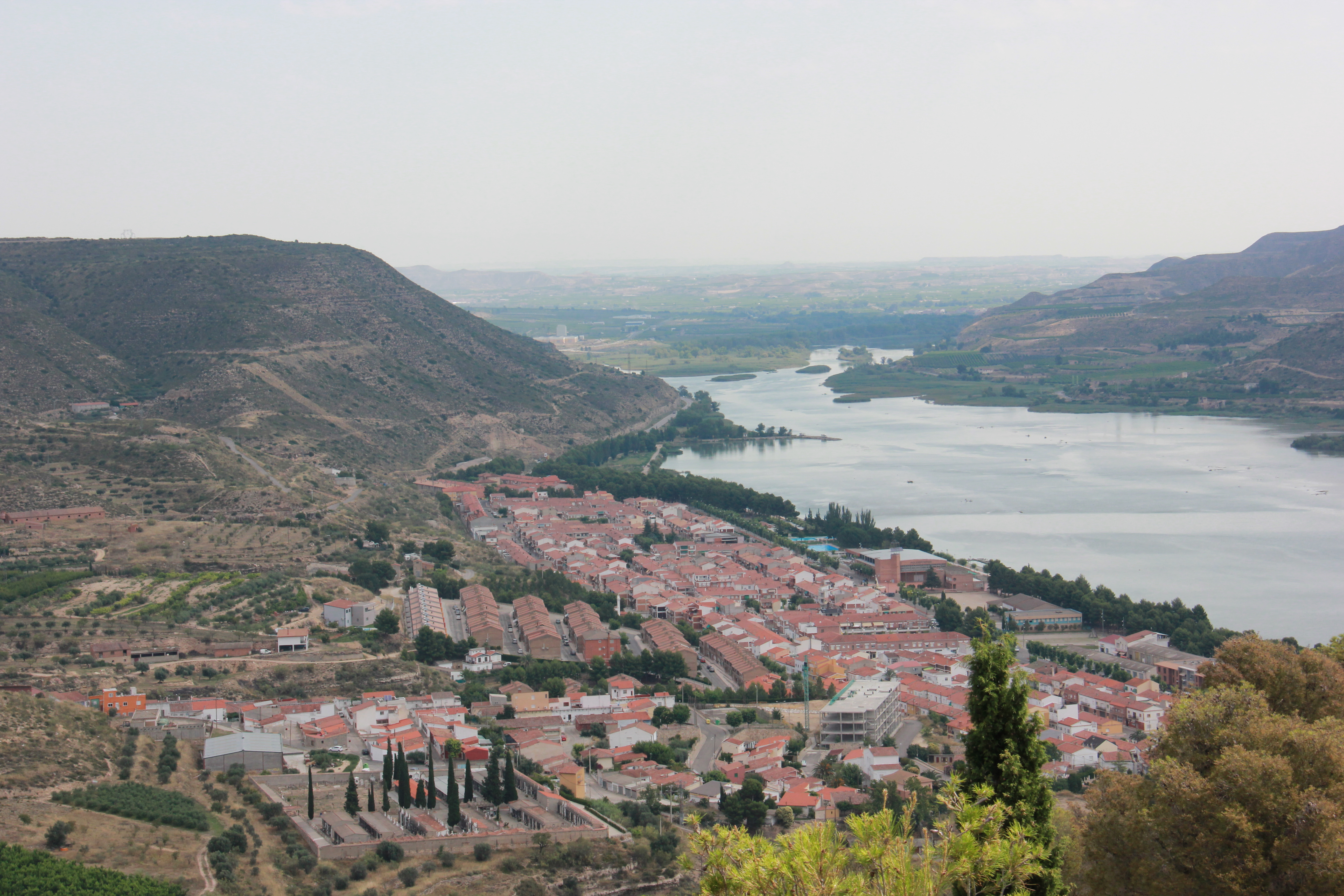 Мекиненса. Вид со стороны замка